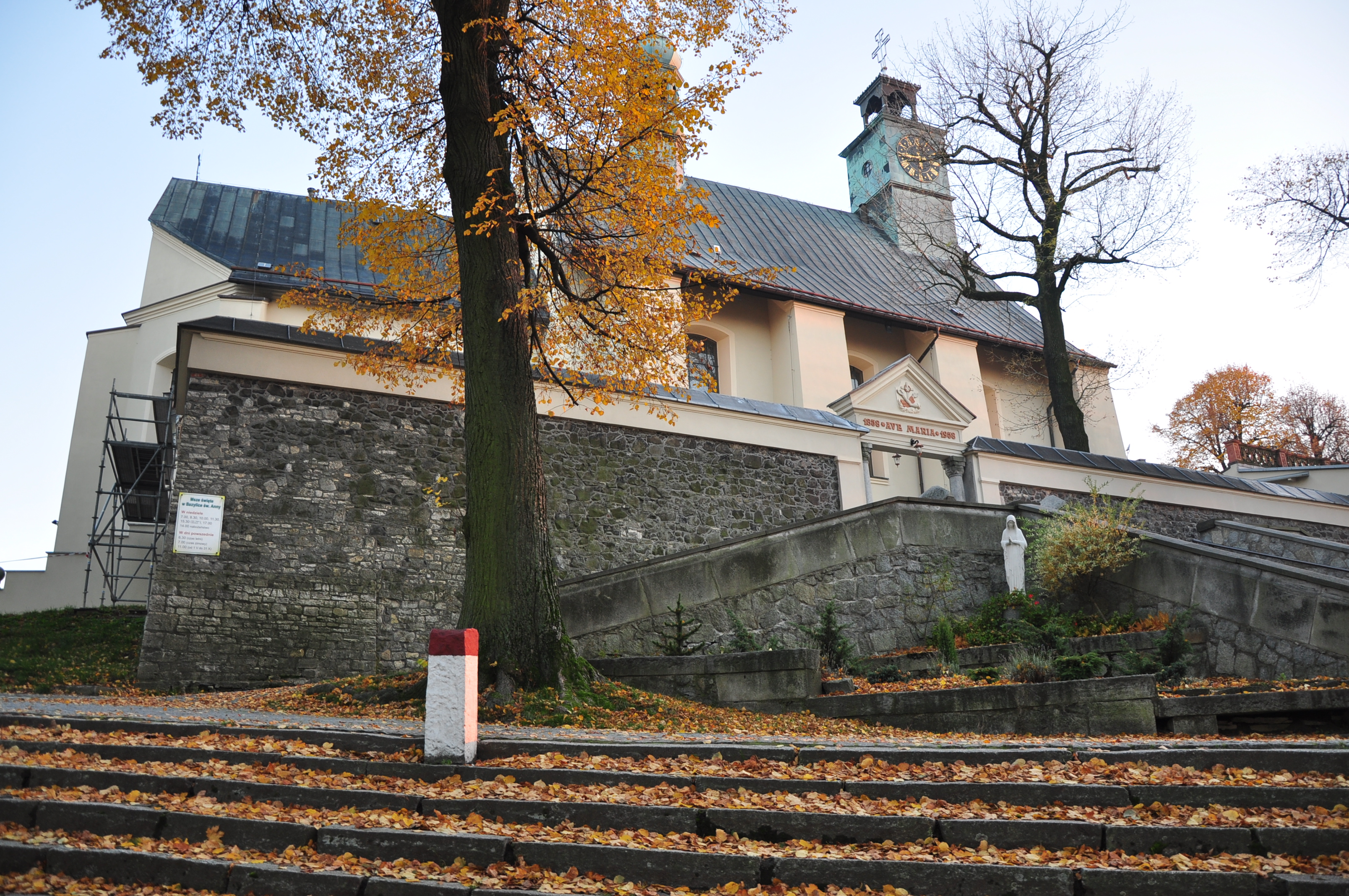 Góra Świętej Anny, kościół p.w. św. Anny, 1480, 1665, XVIII, XIX